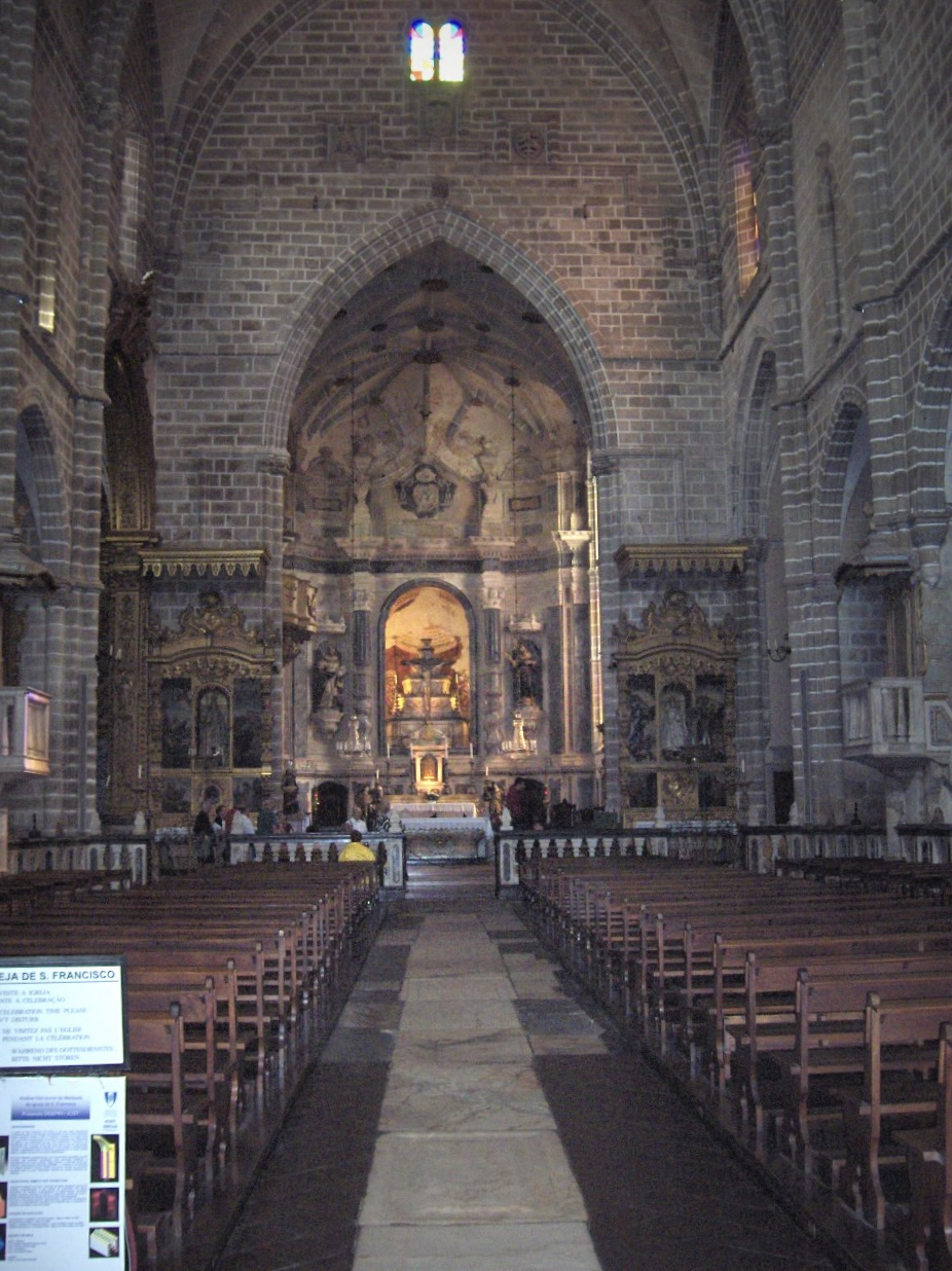 Nave; Igreja de São Francisco, Évora, Portugal